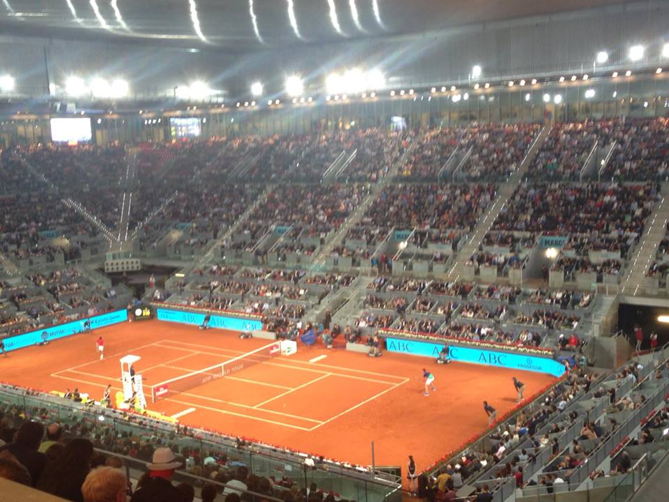 Partido de cuartos de final entre Novak Djokovic y Milos Raonic